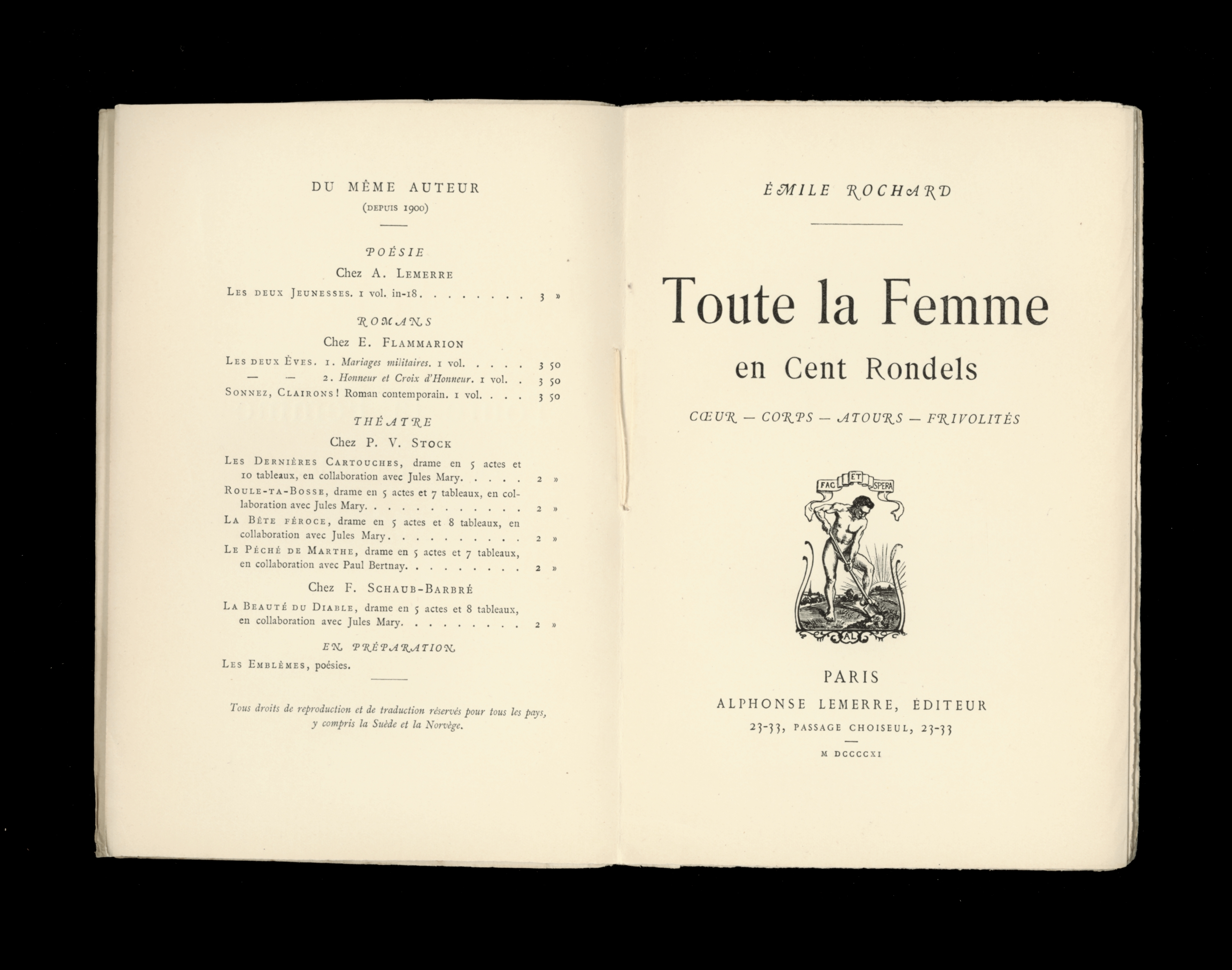 Toutes la Femme en Cent Rondels. Paris, Alphonse Lemerre, 1911